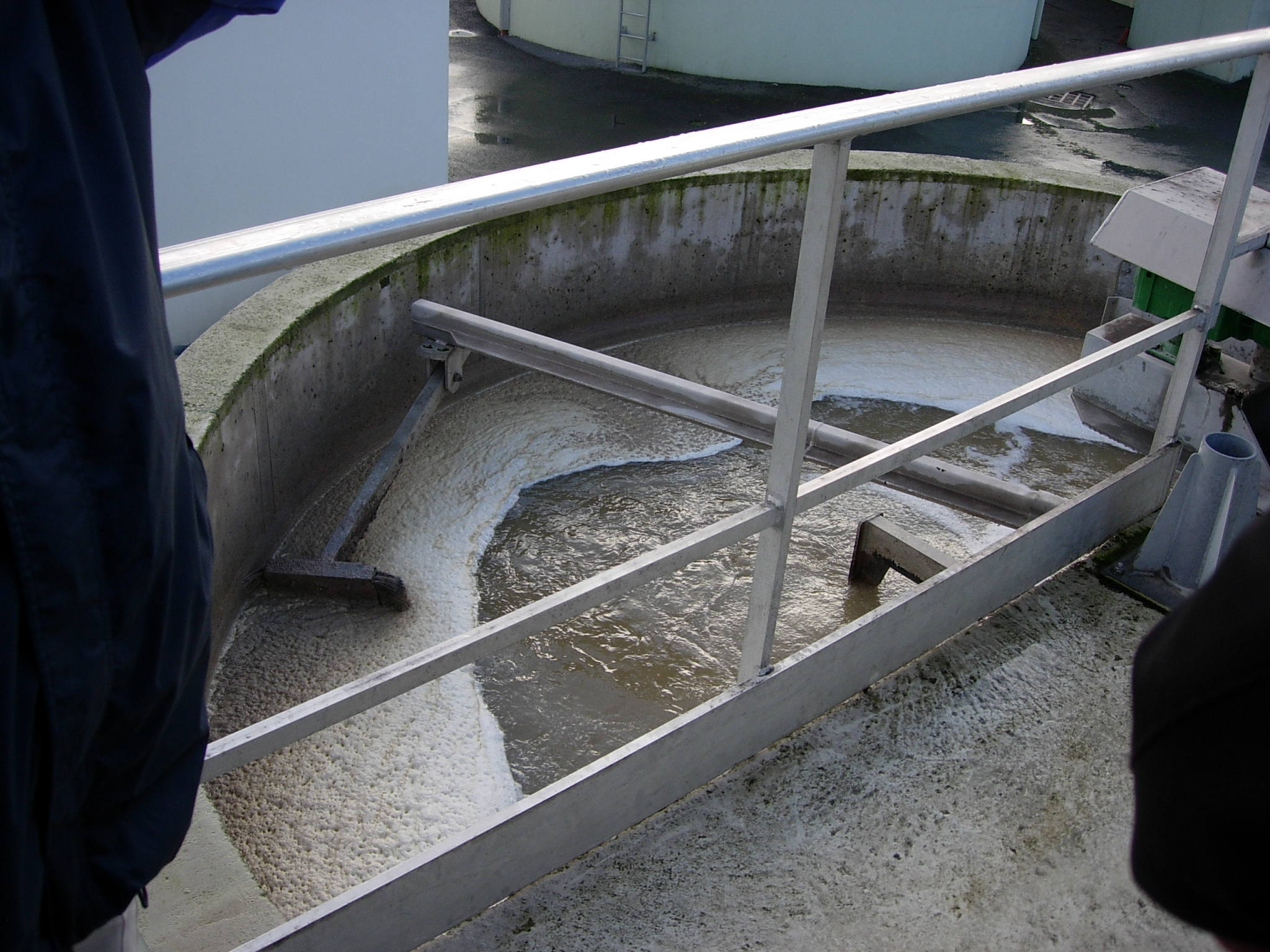 déhuilage